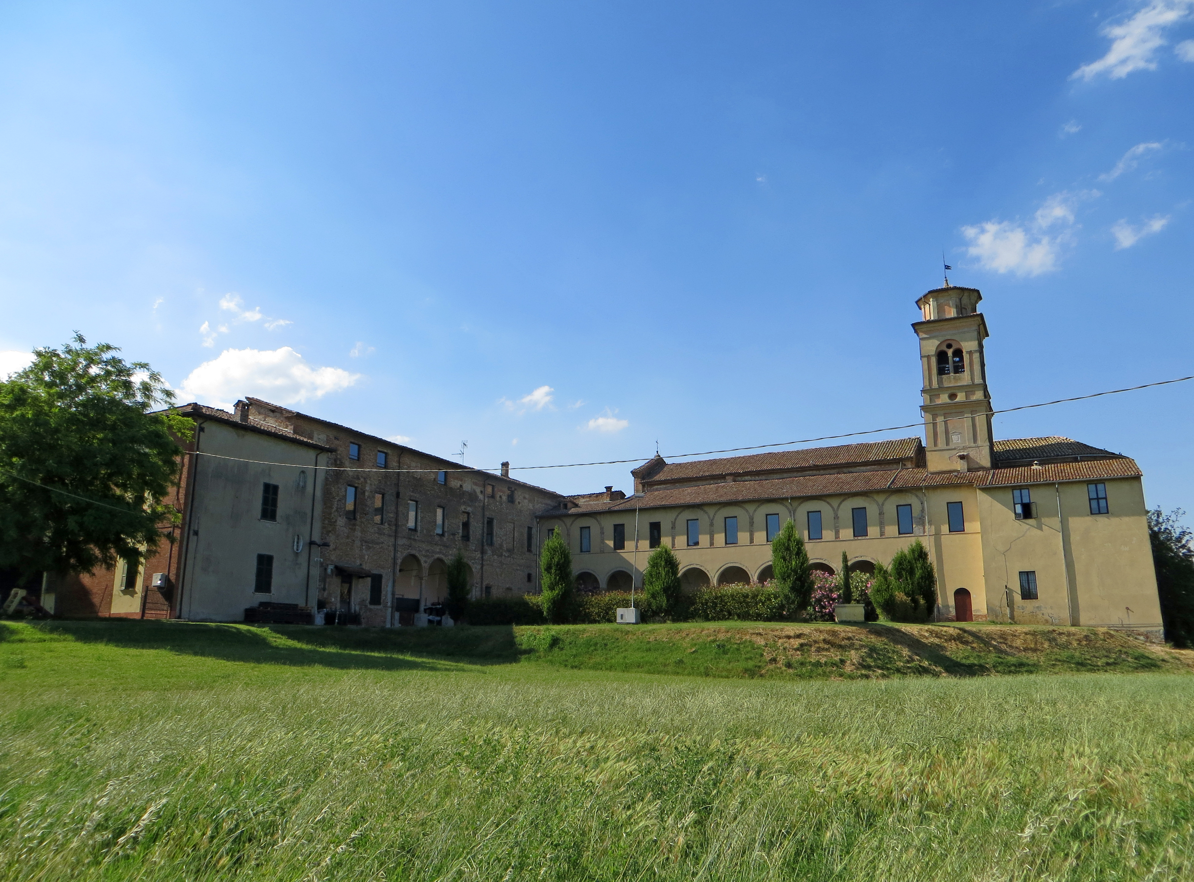 Monastero di Santa Maria Assunta (Castione Marchesi, Fidenza) - lati nord e ovest del chiostro